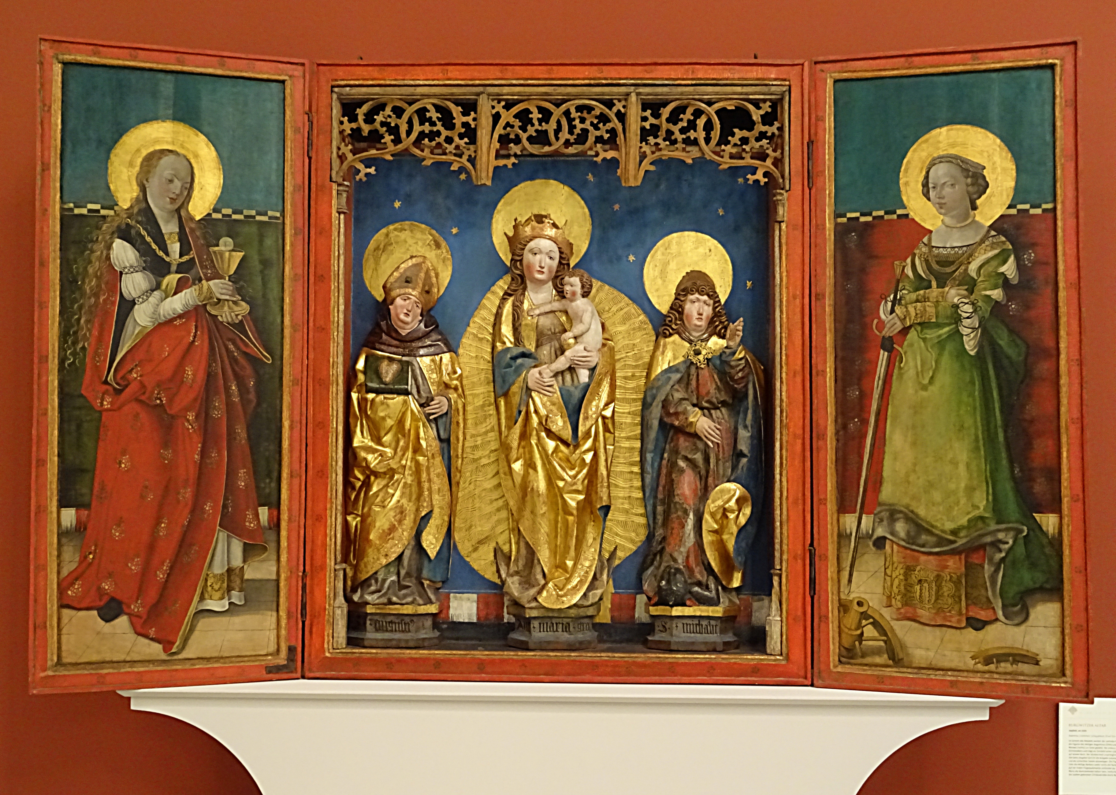 Burgwitzer Altar aus Saalfelder Schule (um 1510) aus der St. Michael Kapelle in Burgwitz (Kospoda). Im Zentrum die Mondsichelmadonna, links der Hl. Augustinus, rechts Erzengel Michael. Auf den Flügeln innen links die Hl. Barbara und rechts die Hl. Katharina. Der Altar ist im Besitz der Klassik Stiftung Weimar und zur Zeit in der Marienkirche (Mühlhausen) zu sehen.[1]